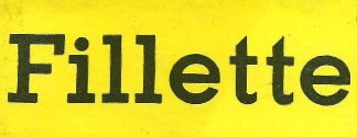 Titre de l'Album n°8, 1962 de Fillette.